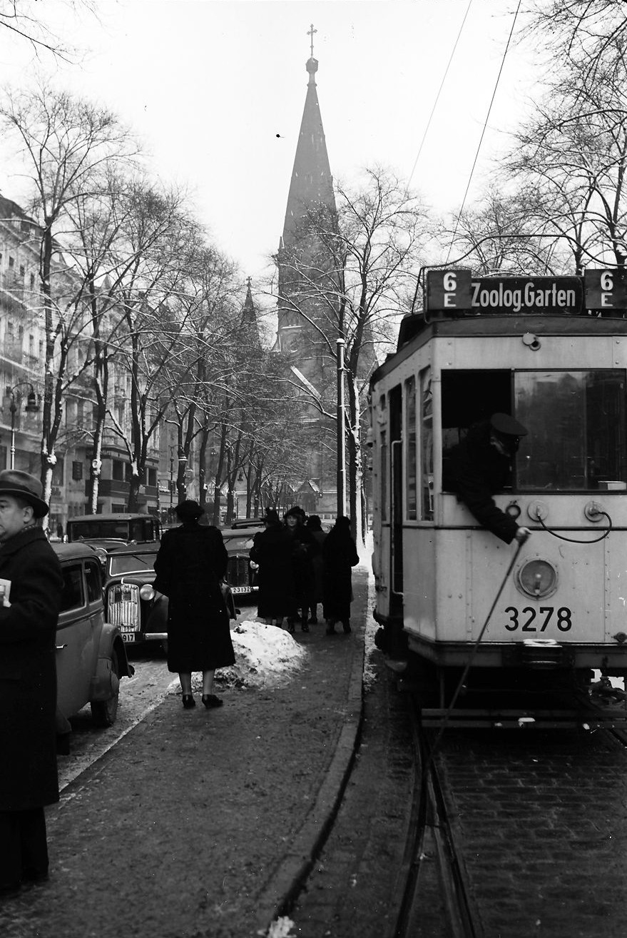 Straßenbahn an der Kreuzung Kurfürstendamm / Joachimsthaler Straße in Berlin-Charlottenburg.